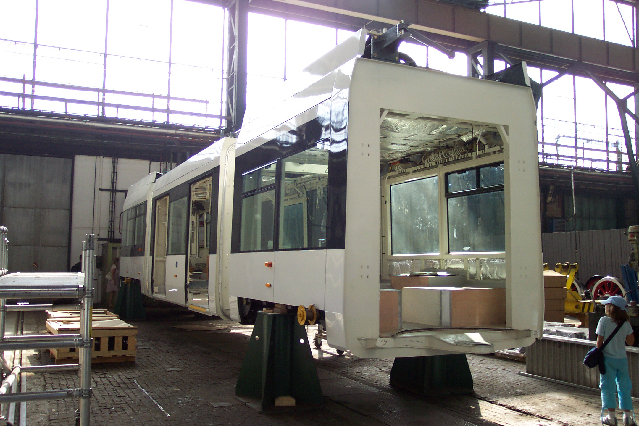 Plzeň, an unfinished tram in Škoda factory - Plzeň, nedokončená tramvaj vyráběná v továrně společnosti Škoda